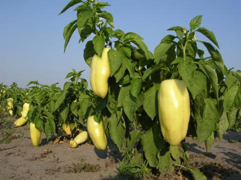 Paprika in Hungary